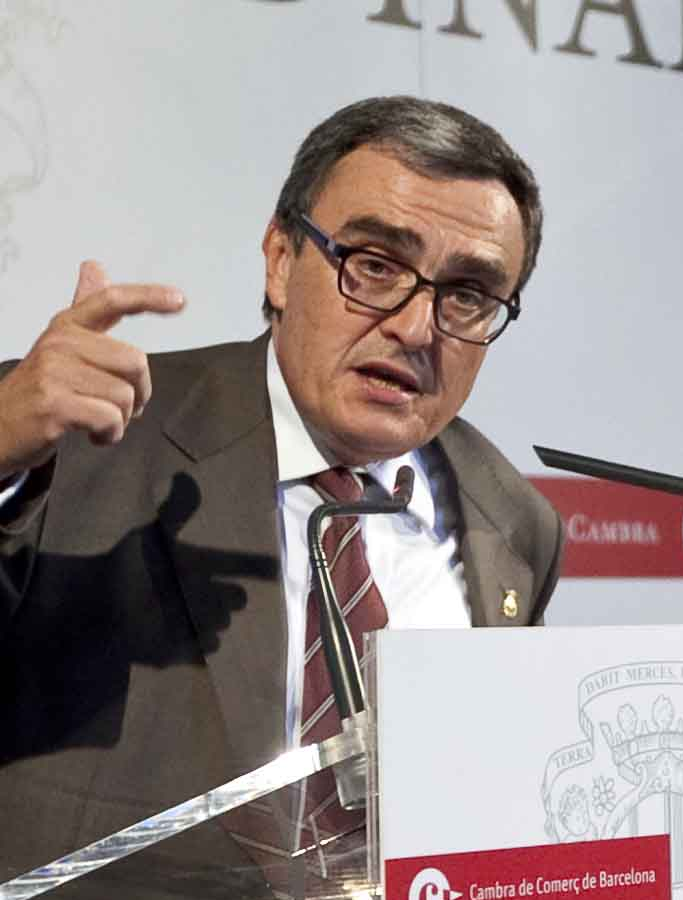 L'alcalde de Lleida, Àngel Ros, explica el model econòmic de les Terres de LLeida en el darrer Dinar Cambra abans de les vacances d'estiu.